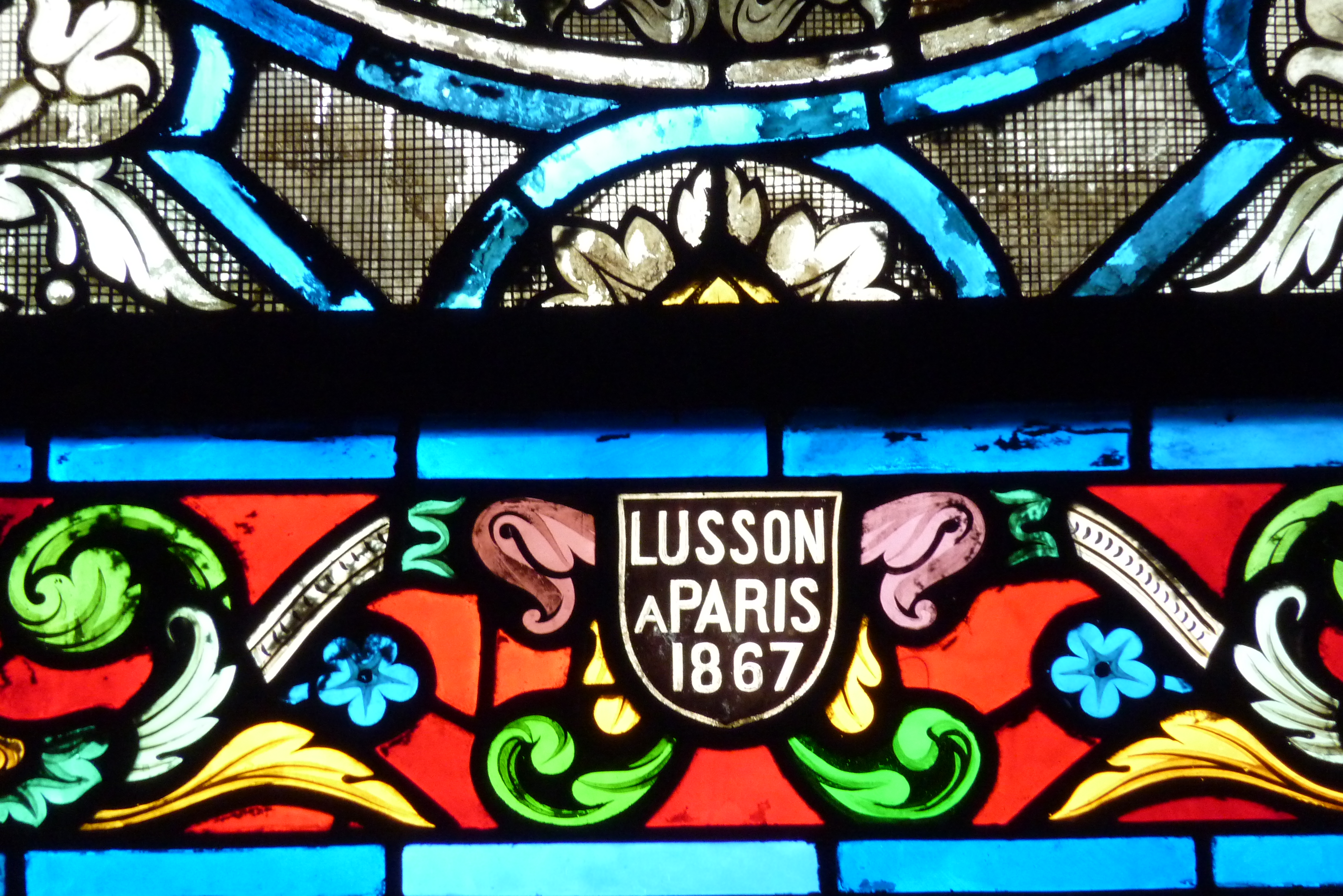 Bleiglasfenster in der katholischen Kirche Saint Augustin in Paris, Darstellung: Signatur "LUSSAN PARIS 1867"